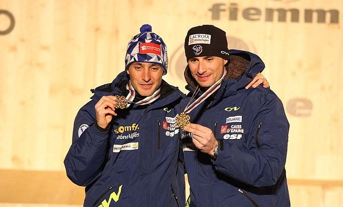 Dekoracja medalowa sprintu drużynowego HS 134/2×7.5 km